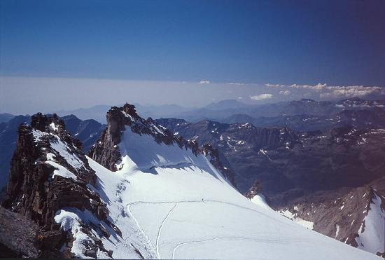 Beklimming van de Gran Paradiso (4.061m) via de gletsjer aan de westkant